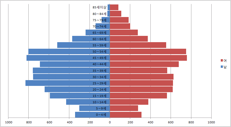 춘의동 인구정보